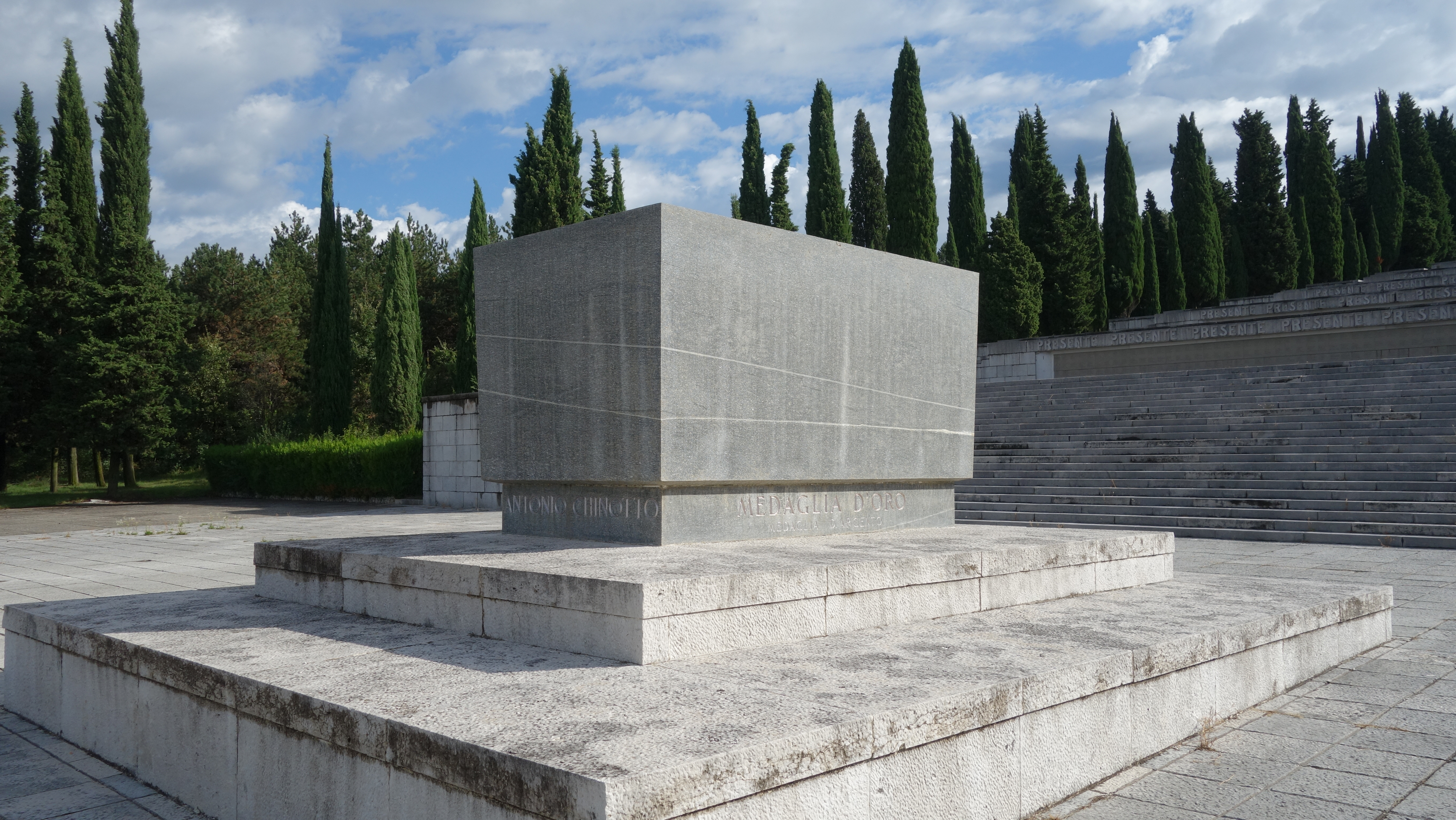 Redipuglia (Gorizia). Tomba del generale Antonio Chinotto al sacrario militare